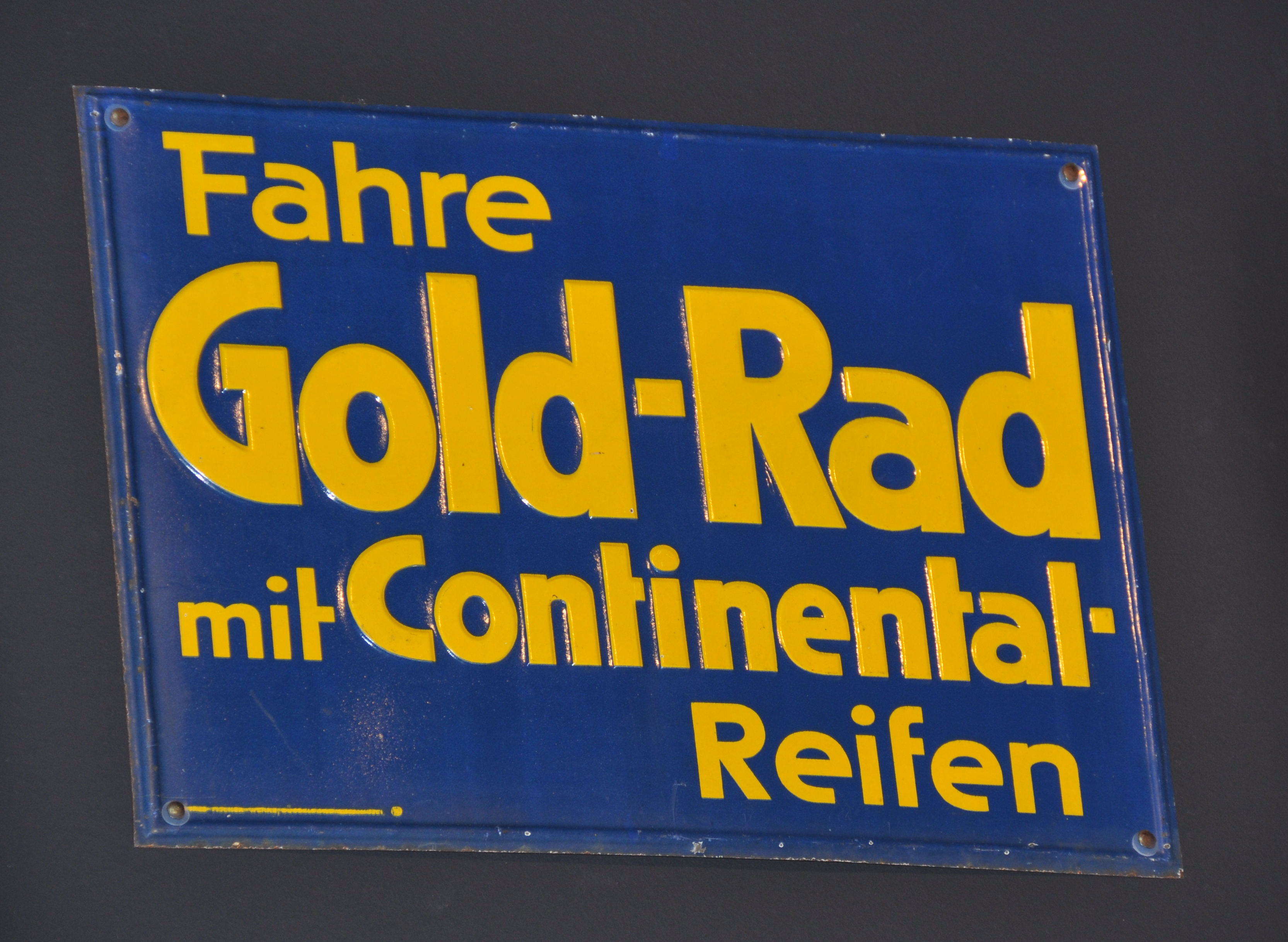 Werbung für Gold-Rad und Continental The making of this document was supported by the Community-Budget of Wikimedia Germany.